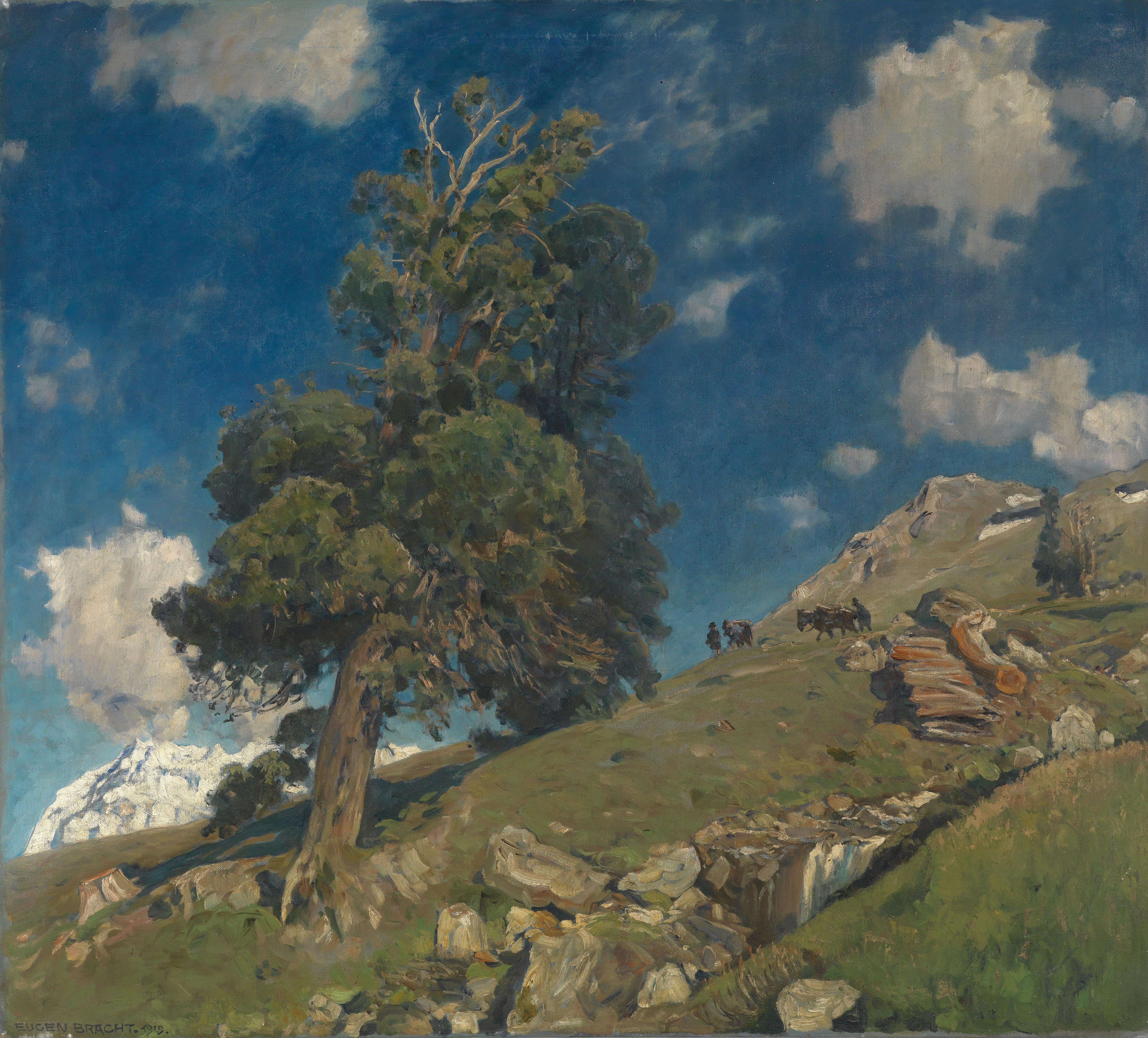 Arve = Pinus cembra